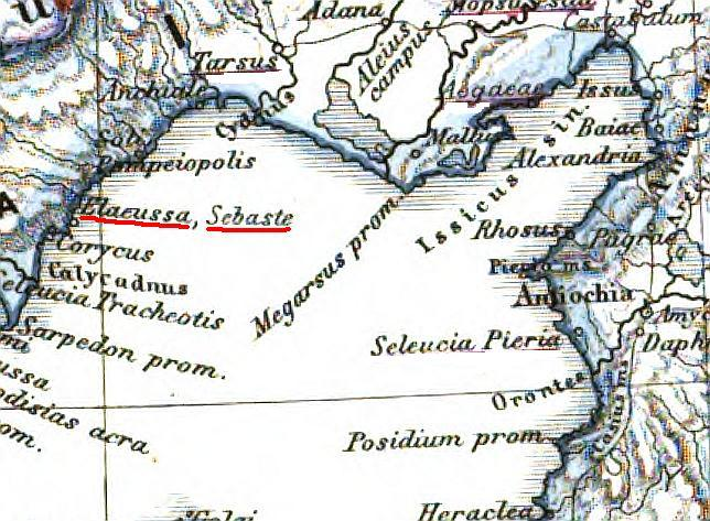 Lage des Ortes Elaioussa-Sebaste